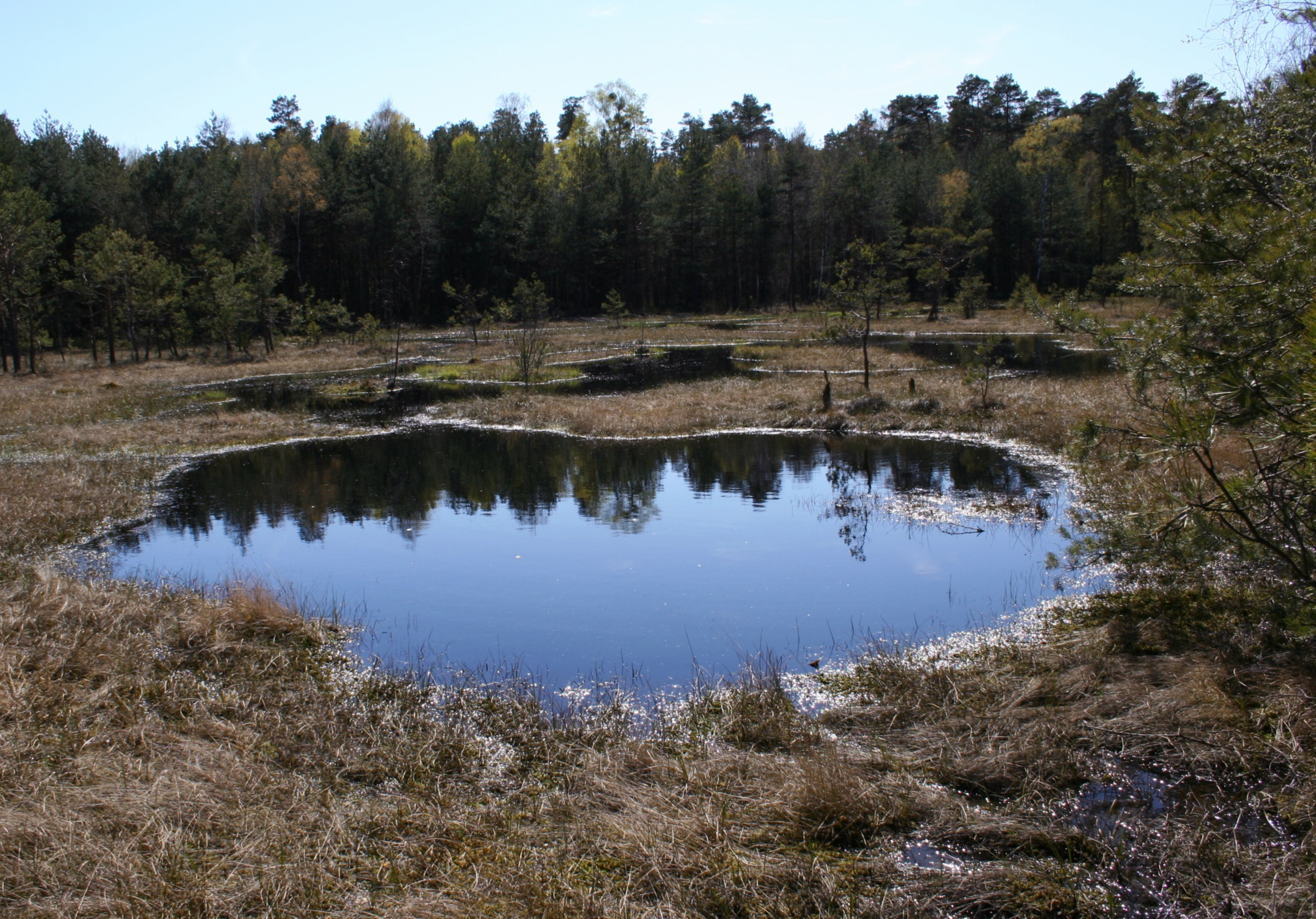 Park Krajobrazowy Lasy nad Górną Liswartą - użytek ekologiczny Jeziorko